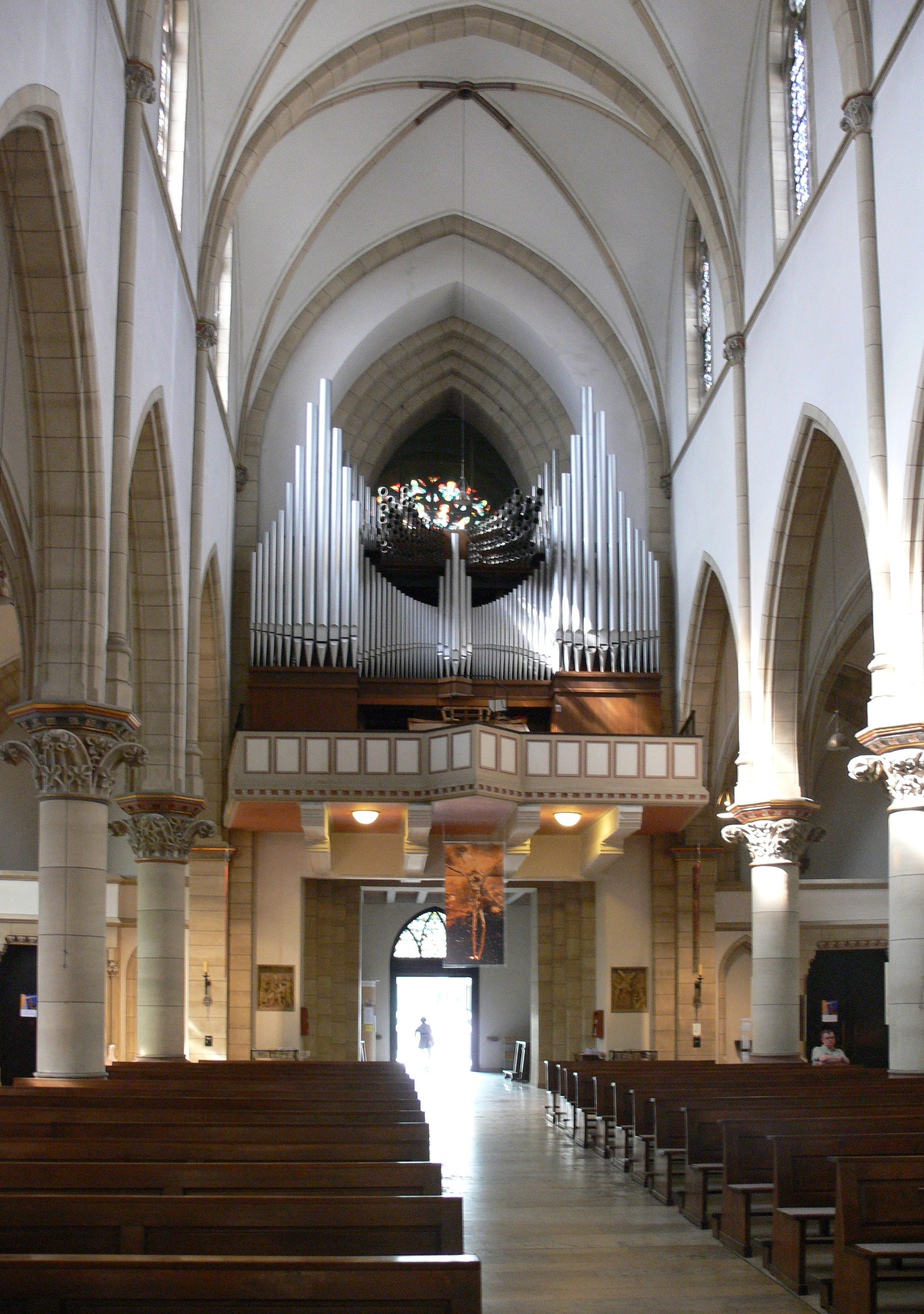 Gelsenkirchen, Propsteikirche St. Augustinus, Blick zur Orgelempore